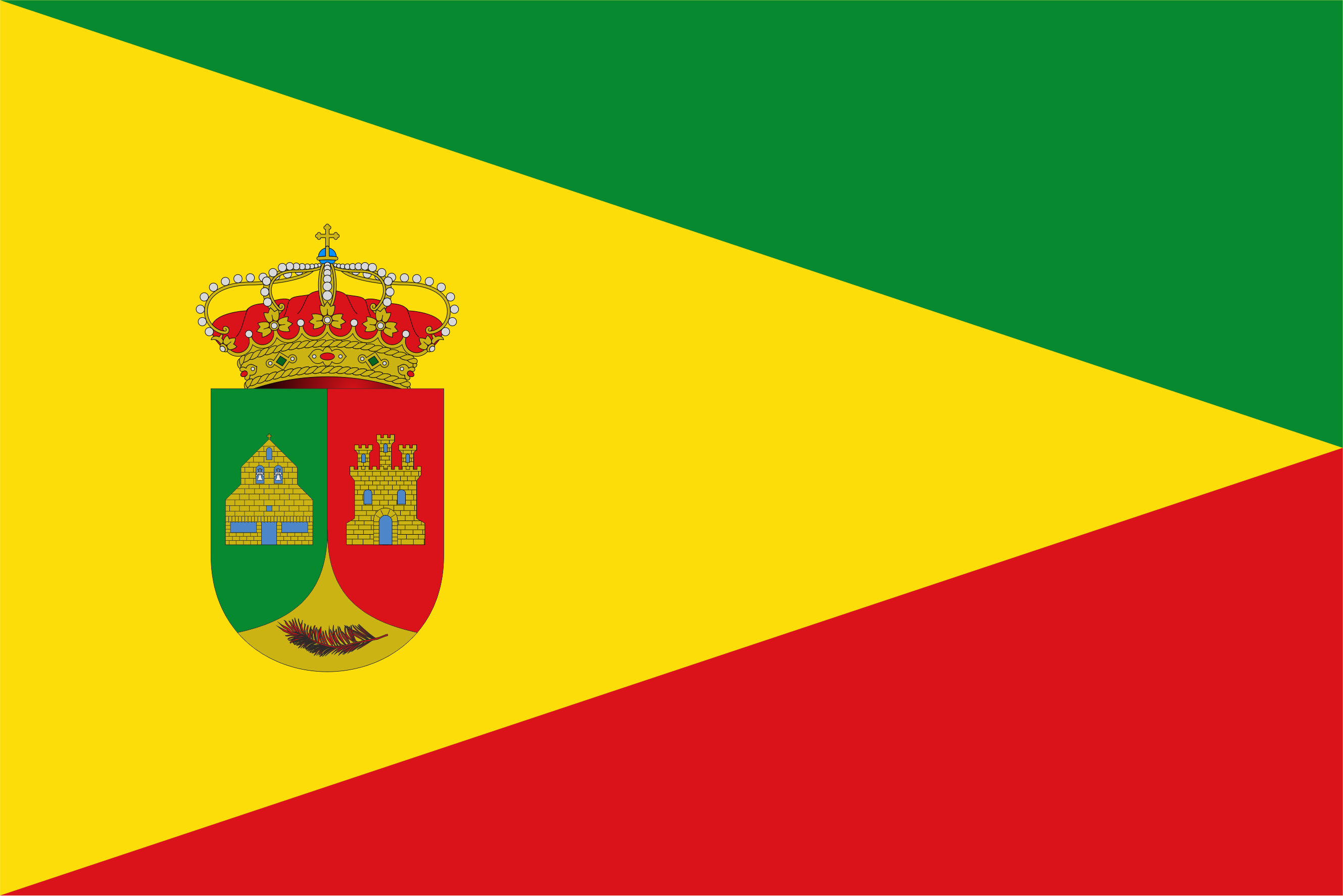 Bandera de San Martín de las Ollas